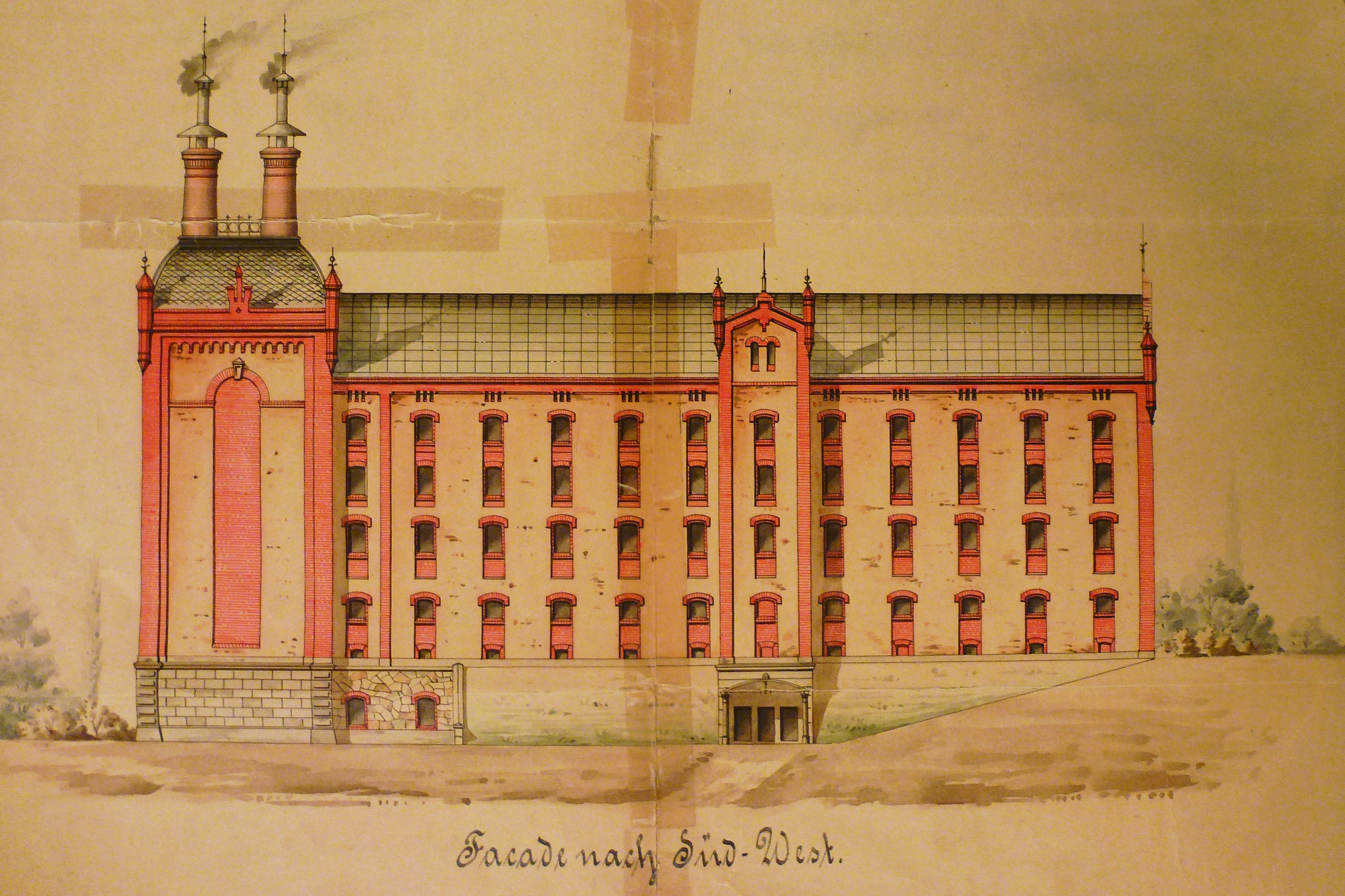 Fasadritning för Stora Bryggeriet i Stockholm utförd av den tyska firman Maschinenfabrik Germania i Chemnitz.